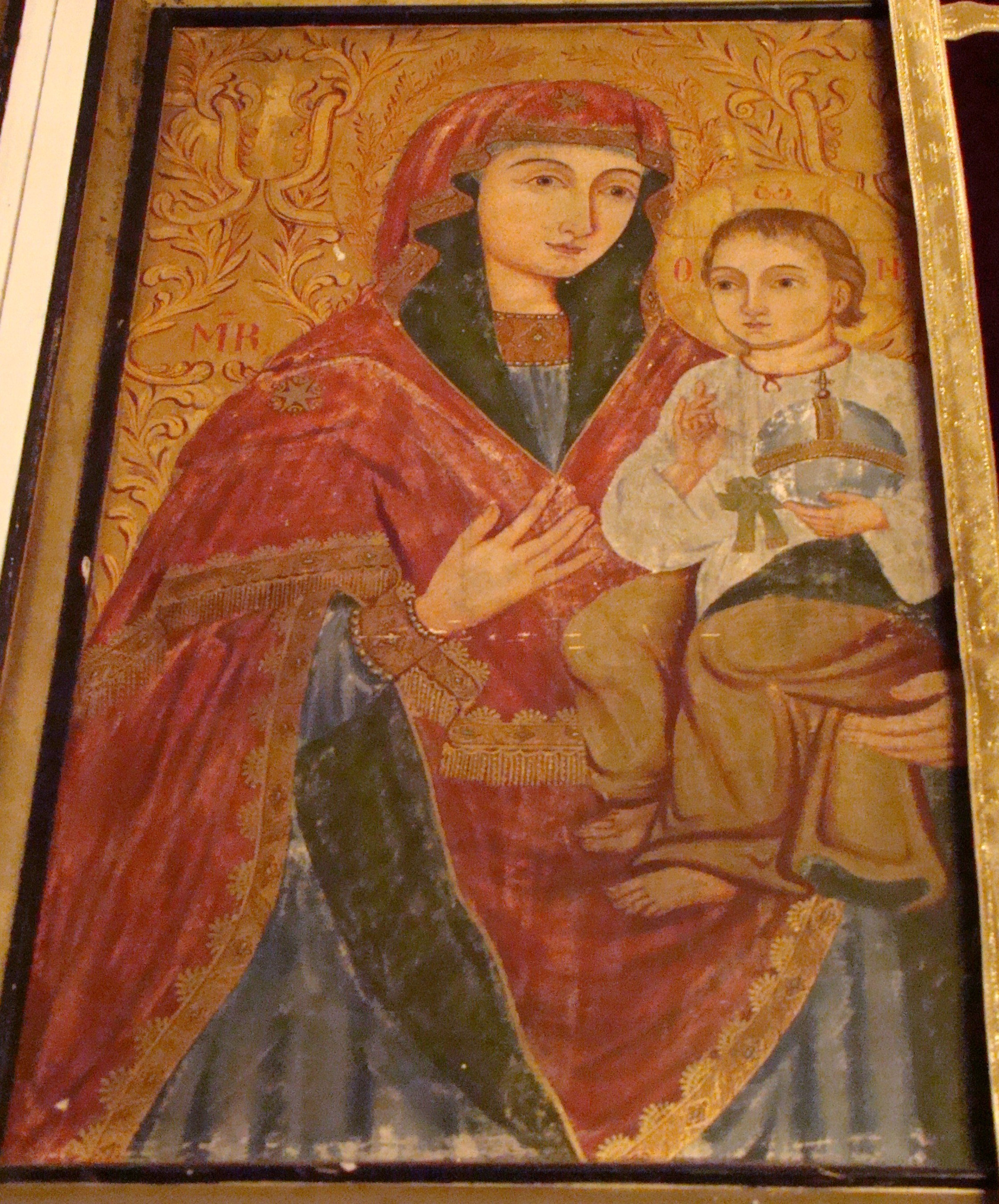 Biserica de lemn „Sf.Nicolae”, cătun Dric, județul Alba